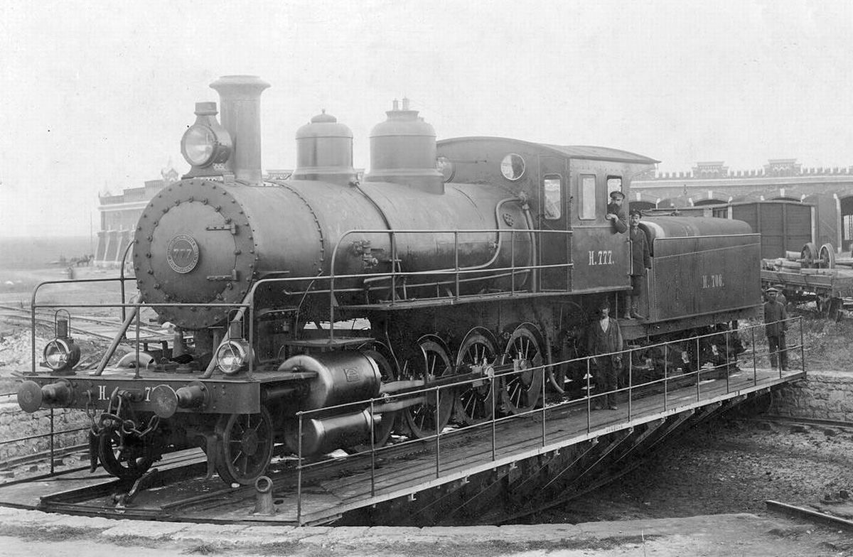 Паровоз Н777 (с 1912 — Х777) на Владикавказской железной дороге